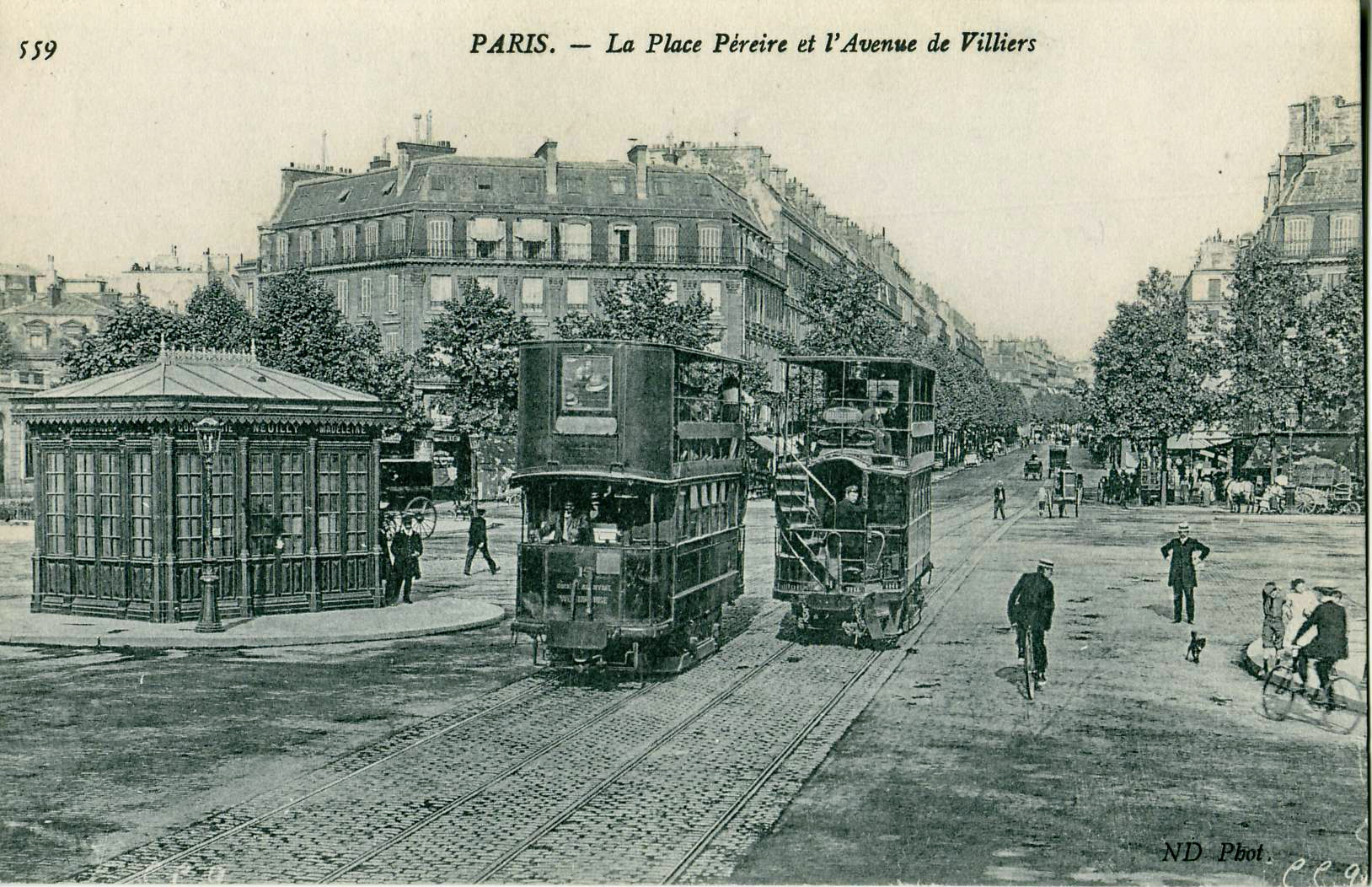 Carte postale ancienne éditée par ND Phot. à Paris, n°559PARIS - La Place Péreire et l'Avenue de VilliersMotrice électrique à accumulateurs type Hellmann, construite en 1897 à 35 ex. pour la TPDS